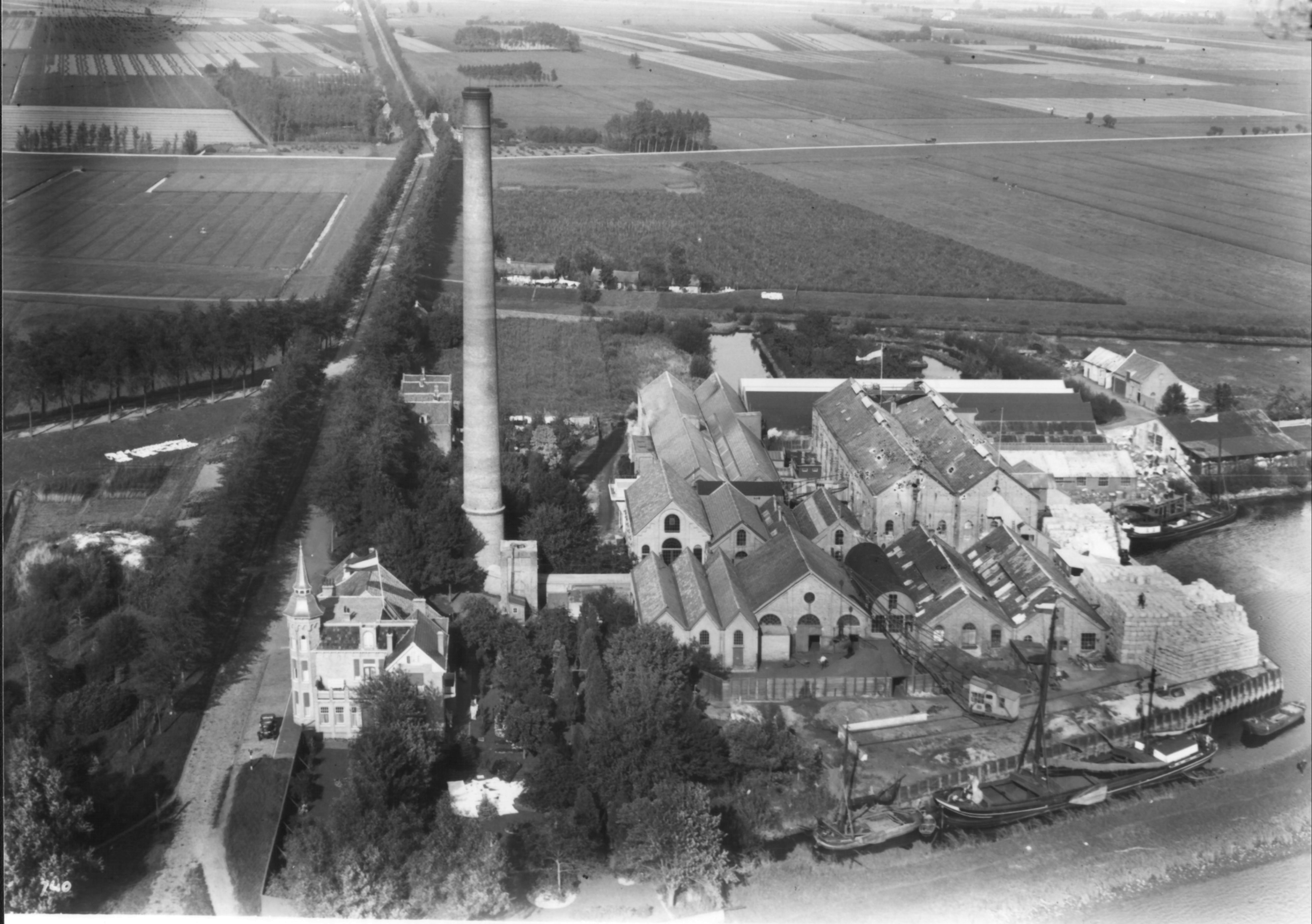 Papierfabriek Maasmond